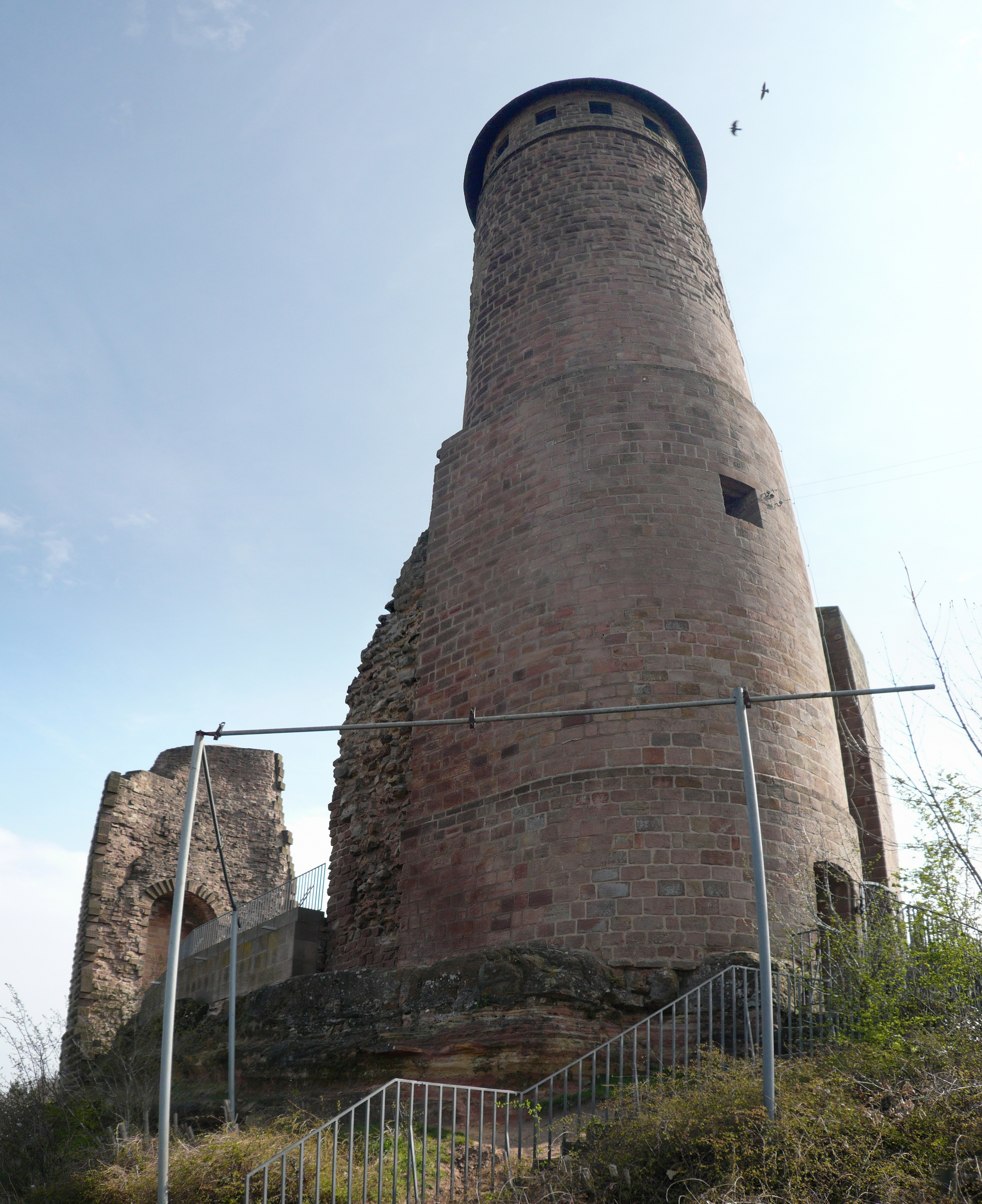 Burg Kirkel (castle)